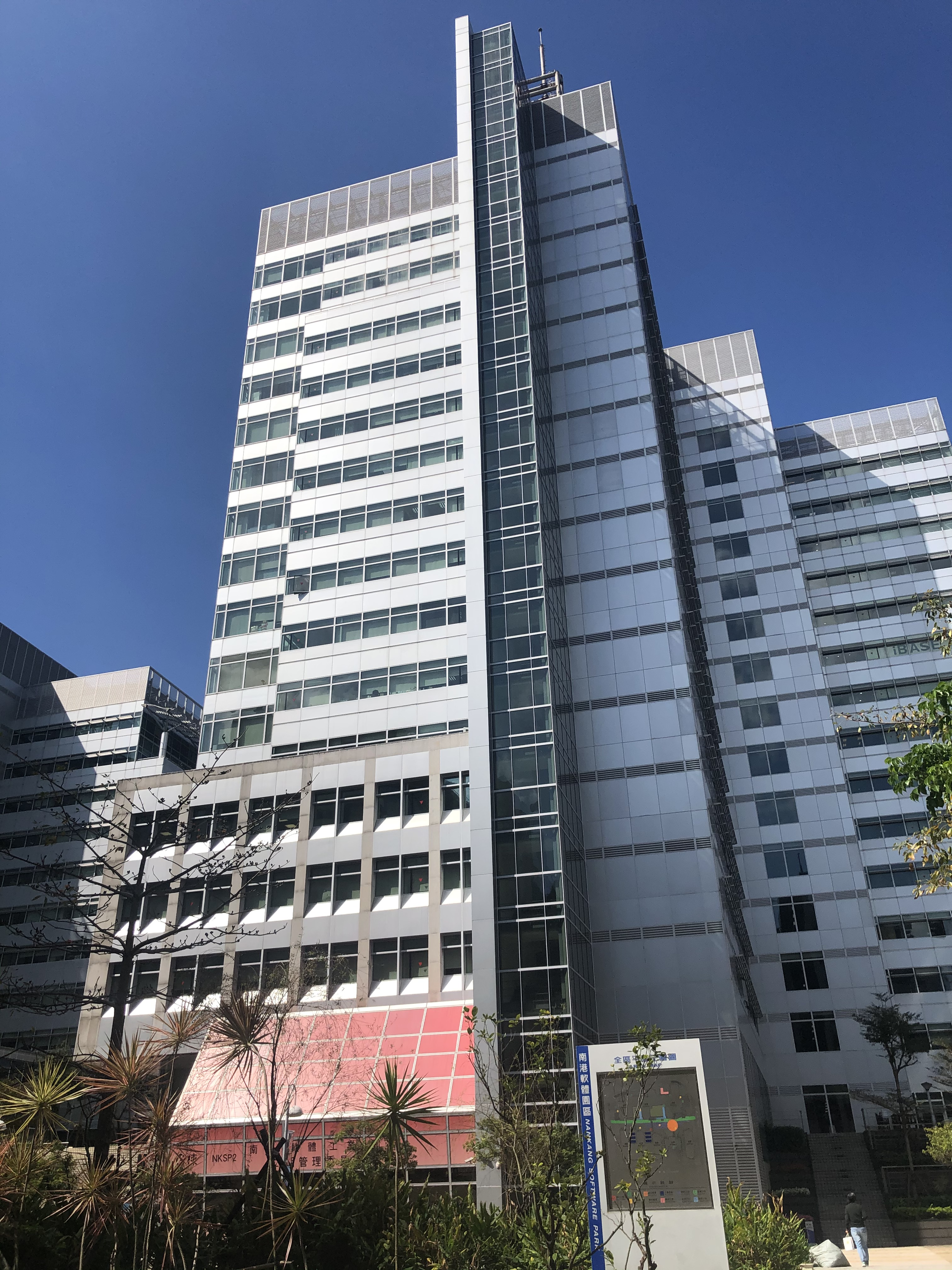 Taipei Nangang Software Park Building G